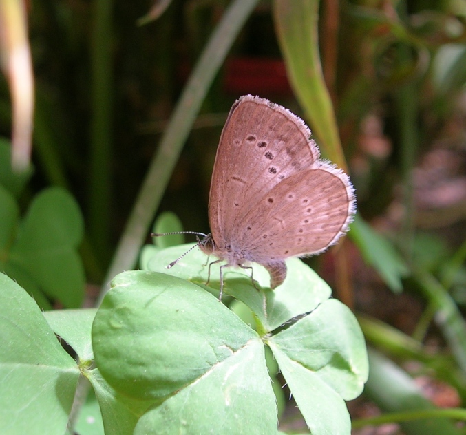 Pseudozizeeria maha laying eggs. Bangalore, India.